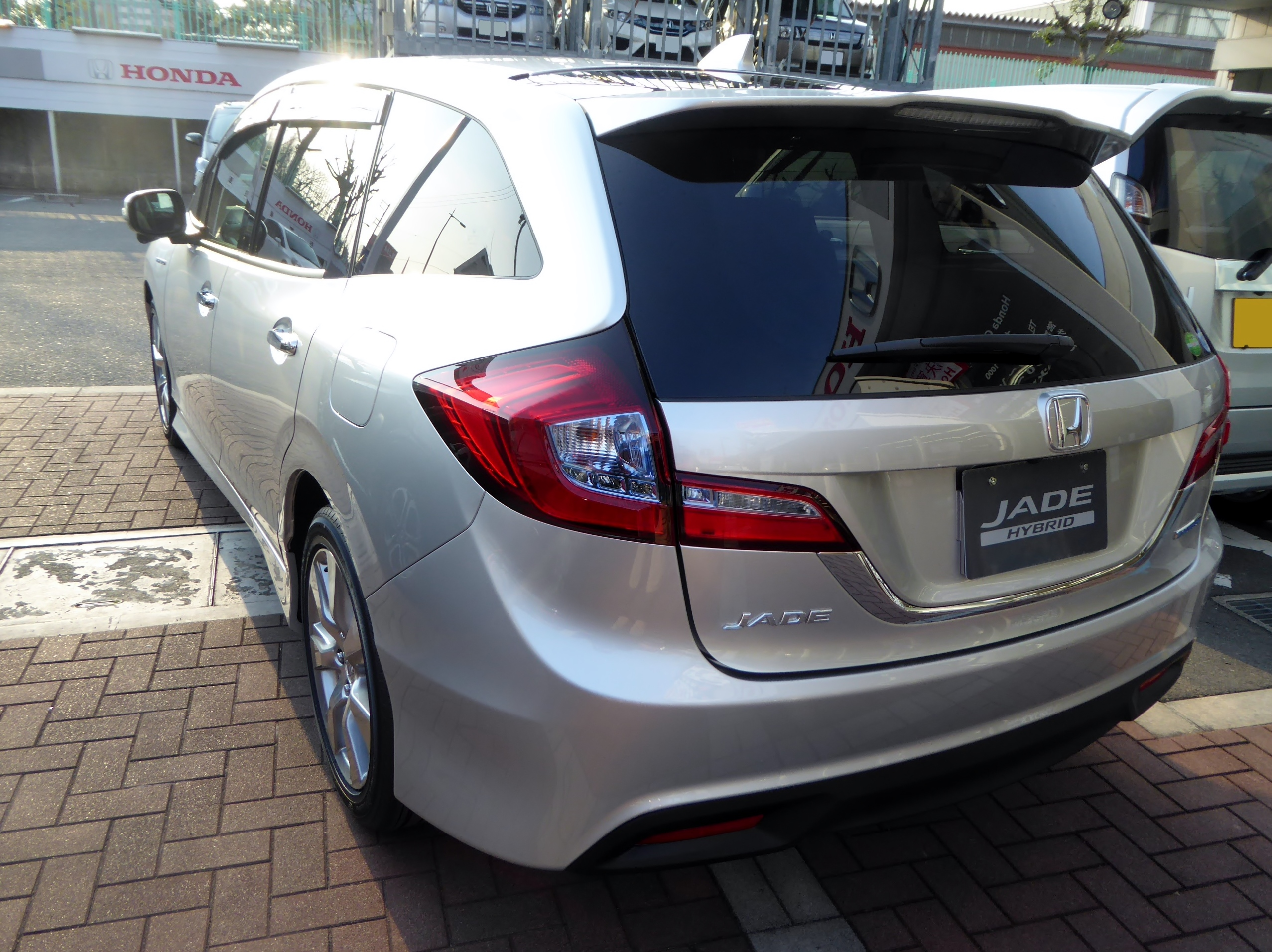 FR4型ホンダ・ジェイドハイブリッドXをリアから撮影。